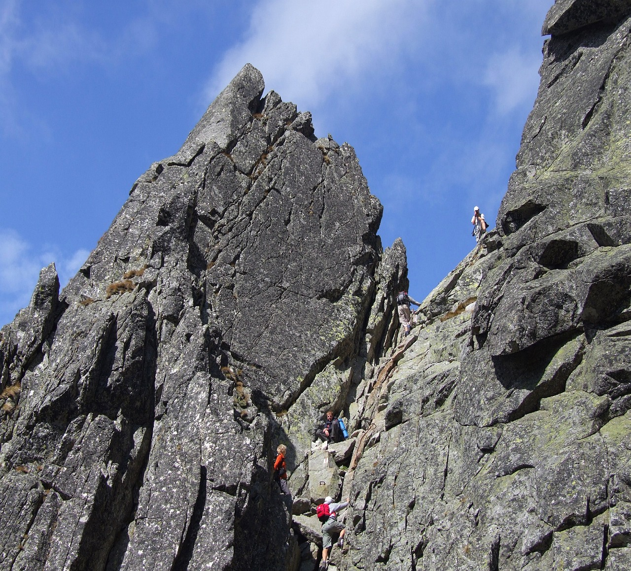 Czarny Mniszek i komin pod Czarnym Mniszkiem